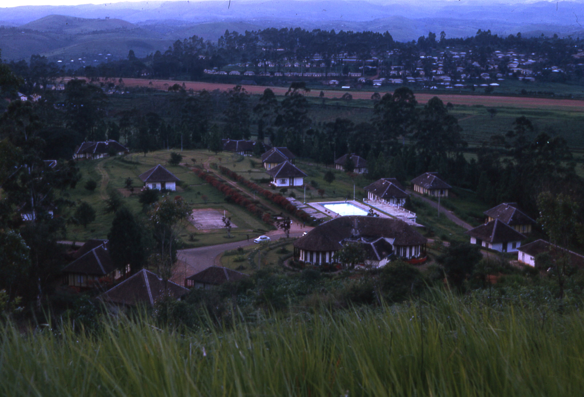 016R-Cam111 - Dschang: Le Centre climatique en 1966 en saison des pluies.